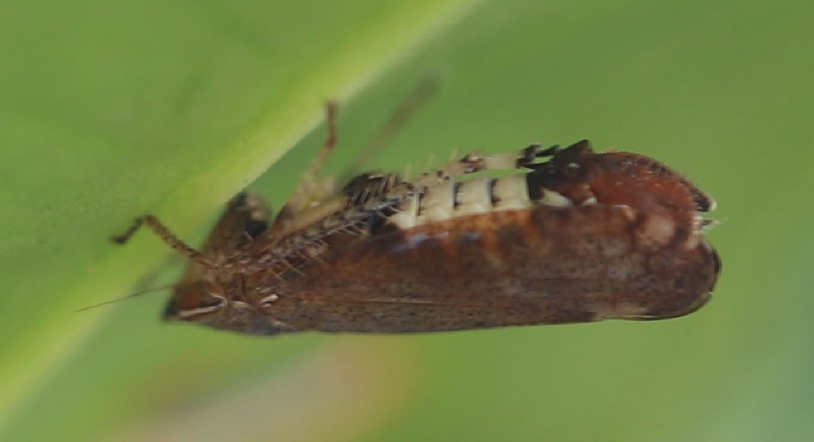 Die Südliche Strauchzirpe Fieberiella florii auf der Unterseite eines Kirschlorbeerblattes am 17. Juli 2020